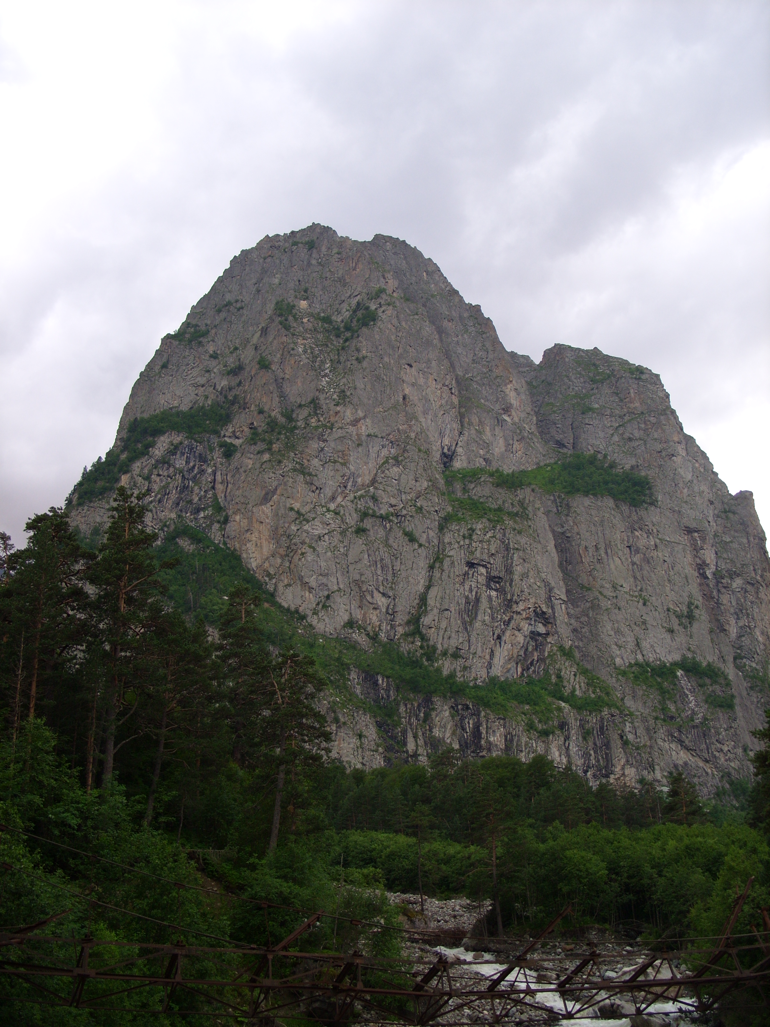 Снимки сделаны во время автобусной экскурсии из Железноводска, июль 2009 г.